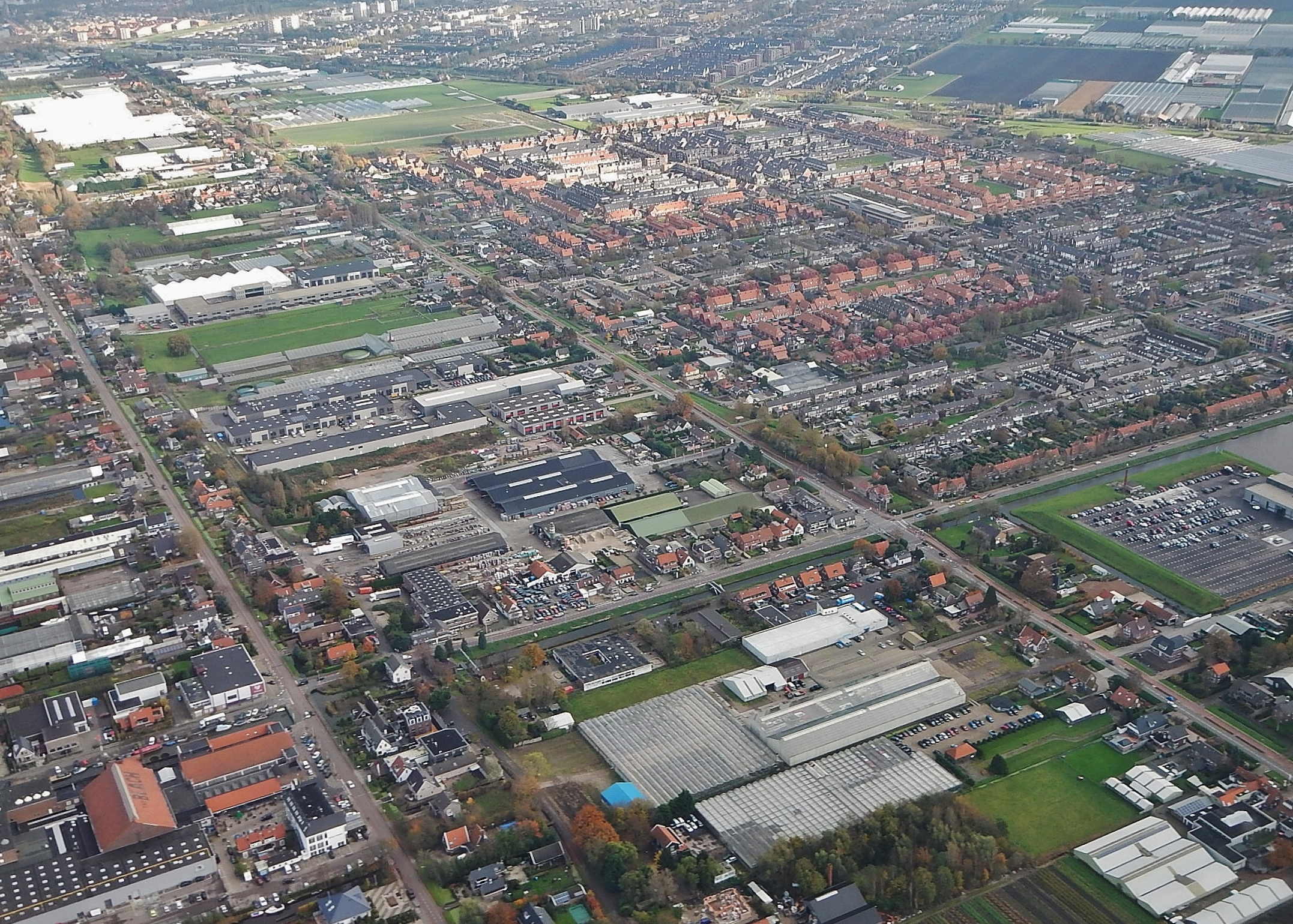 Flight to AMS, Amsterdam Airport Schiphol, Luchthaven Schiphol, Flughafen Amsterdam Schiphol